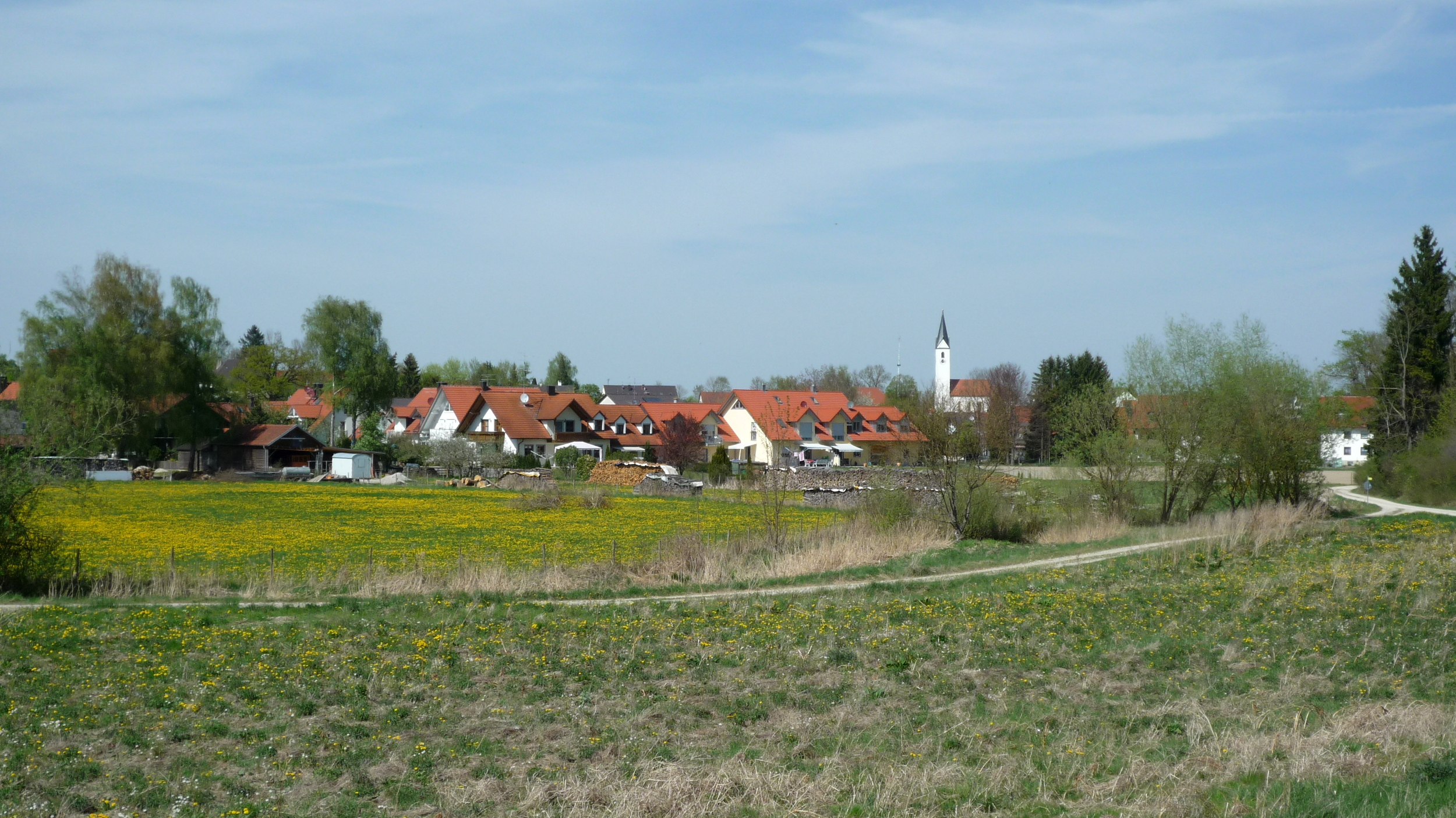 Oberhummel (Ortsteil von Langenbach)